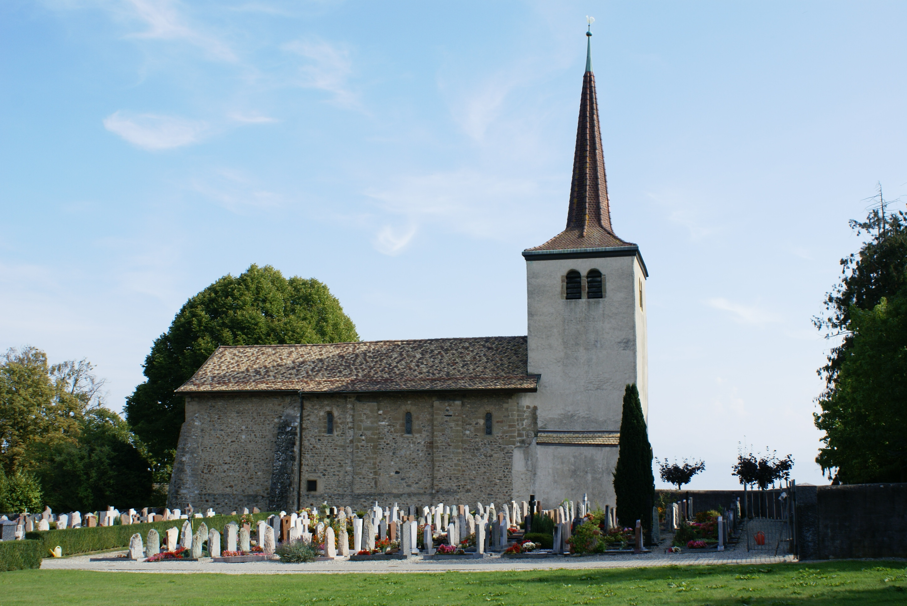 vue latérale du temple et du cimetière de St-Prex (Suisse)